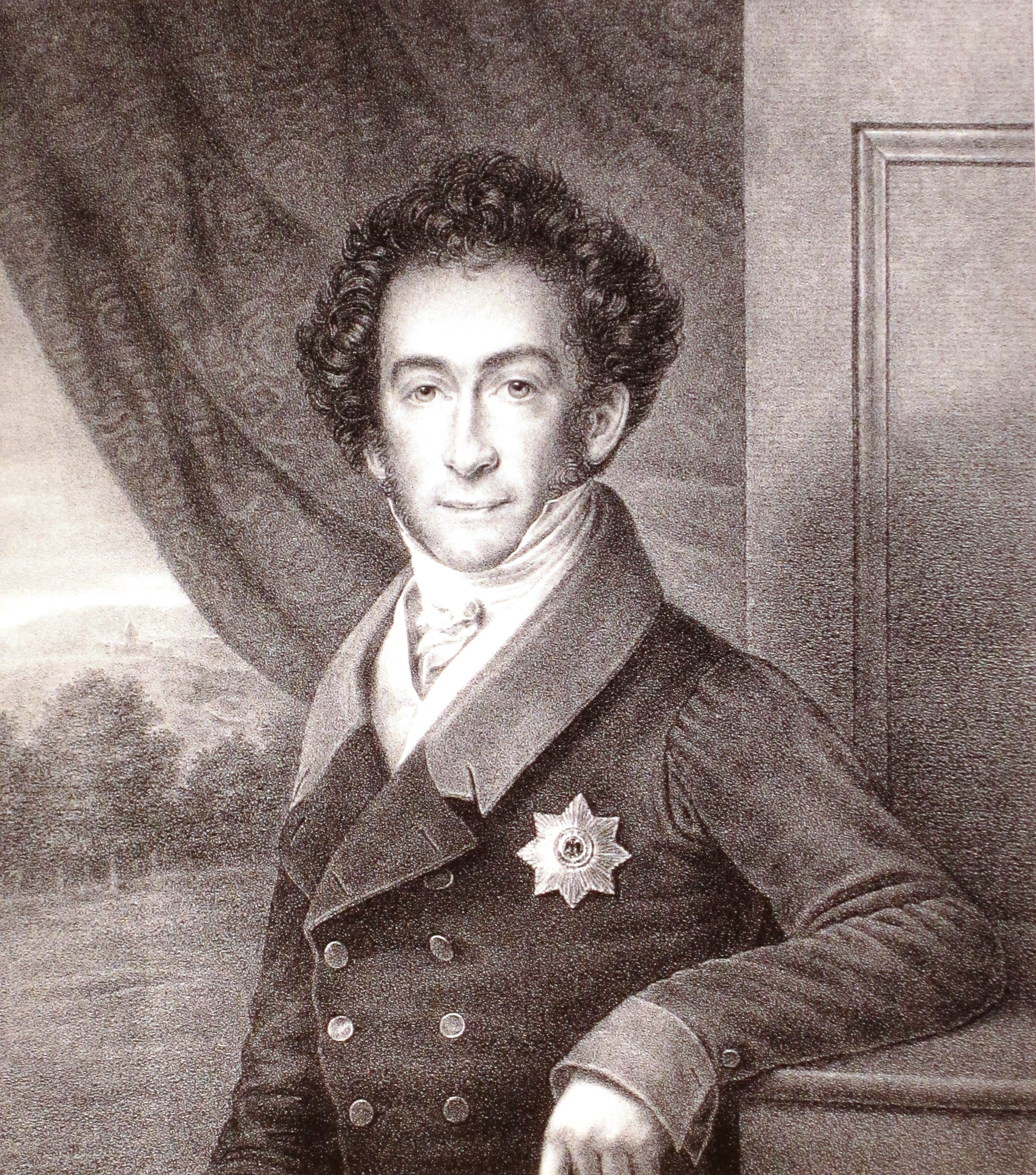 Georg, Großherzog von Mecklenburg (1779–1860)